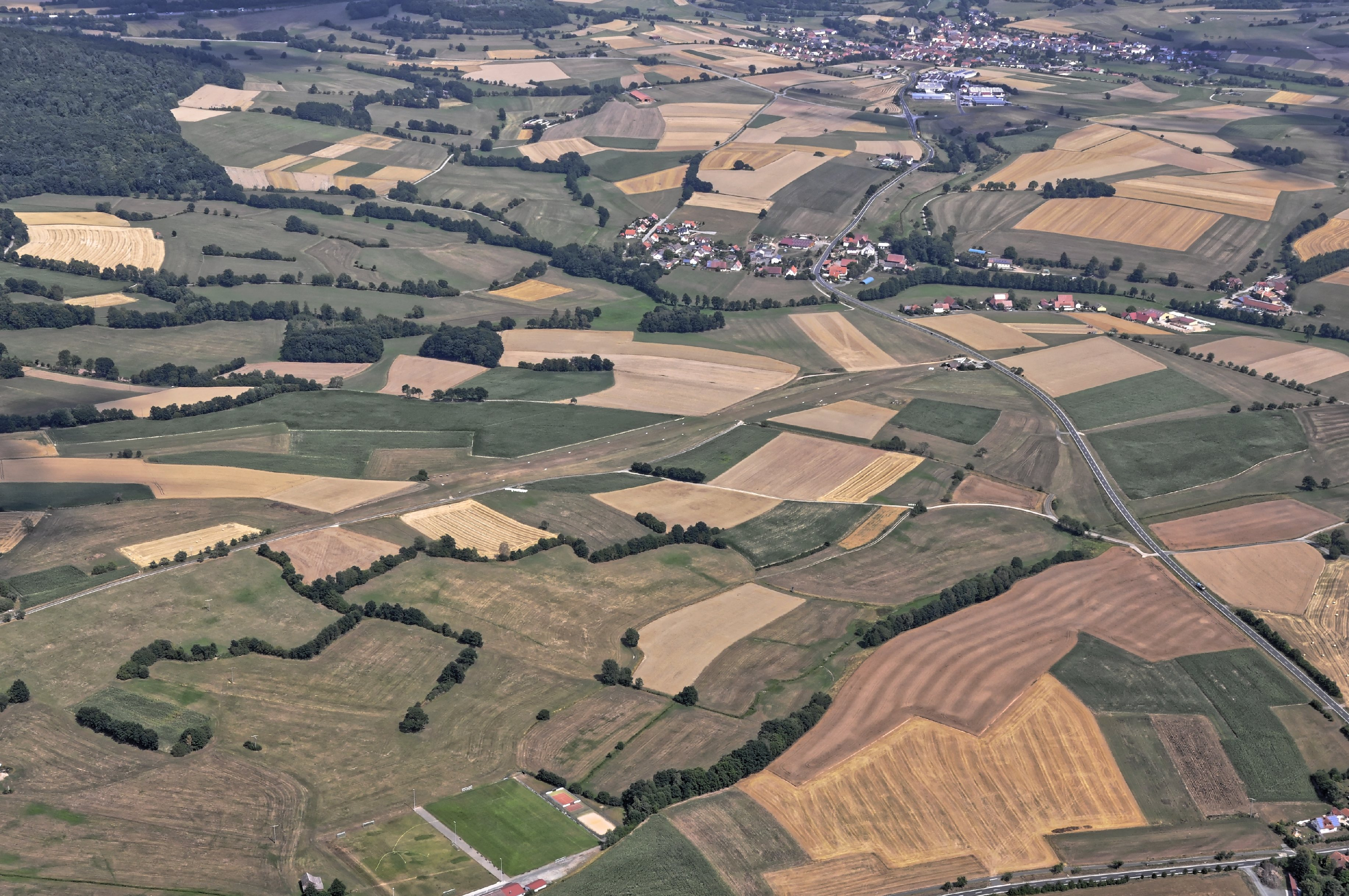 Bilder vom Flug Nordholz-Hammelburg 2015: Flugfeld Oberleichtersbach; im Hintergrund Einraffshof und Schondra.